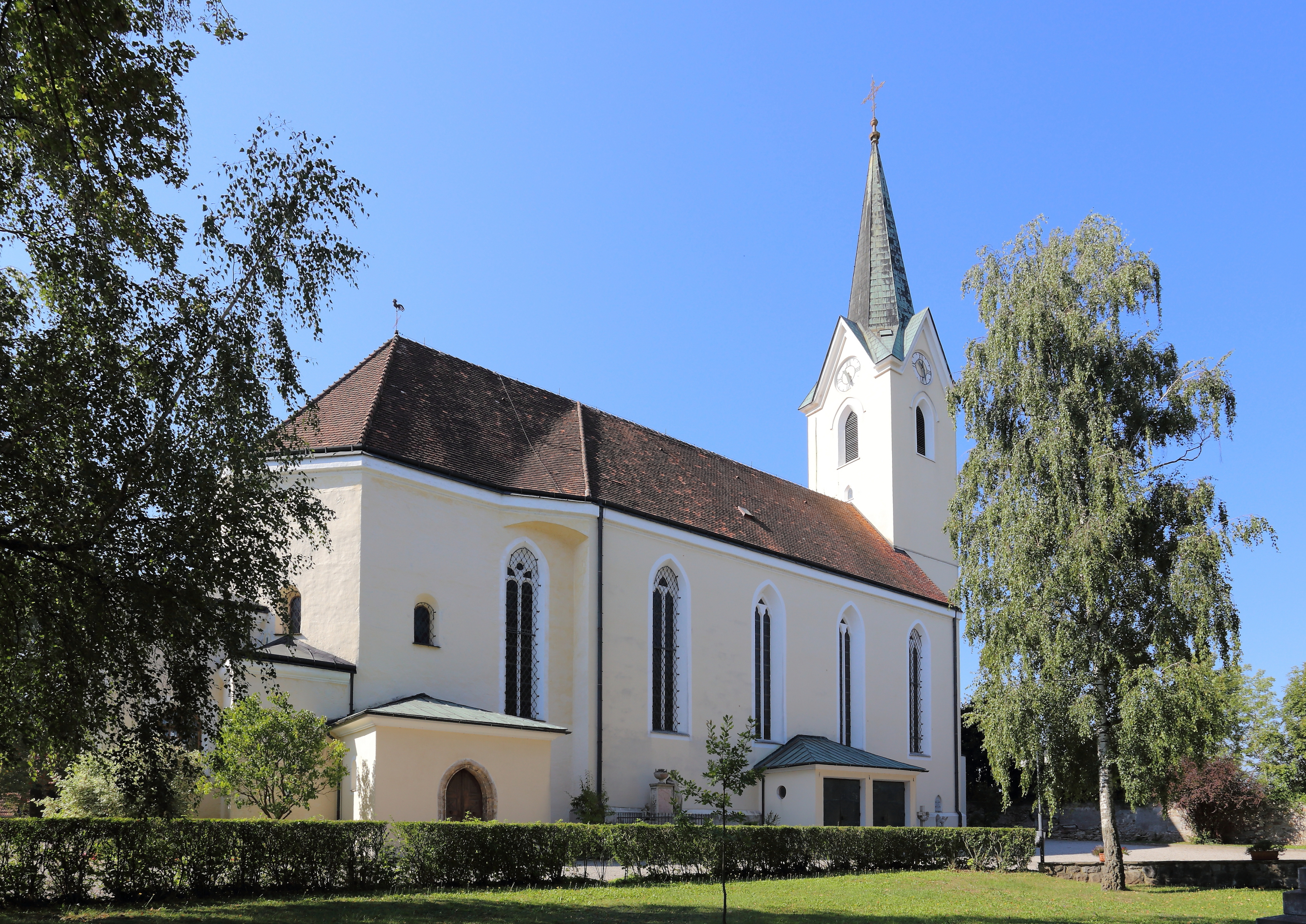 Nordansicht der (alten) Pfarrkirche der niederösterreichischen Stadt Wieselburg. Langhaus und Turm wurden um 1500/1555 errichtet und der ottonische Zentralbau mit aufgesetztem Oktogon aus dem 10. Jahrhundert als Chor adaptiert.